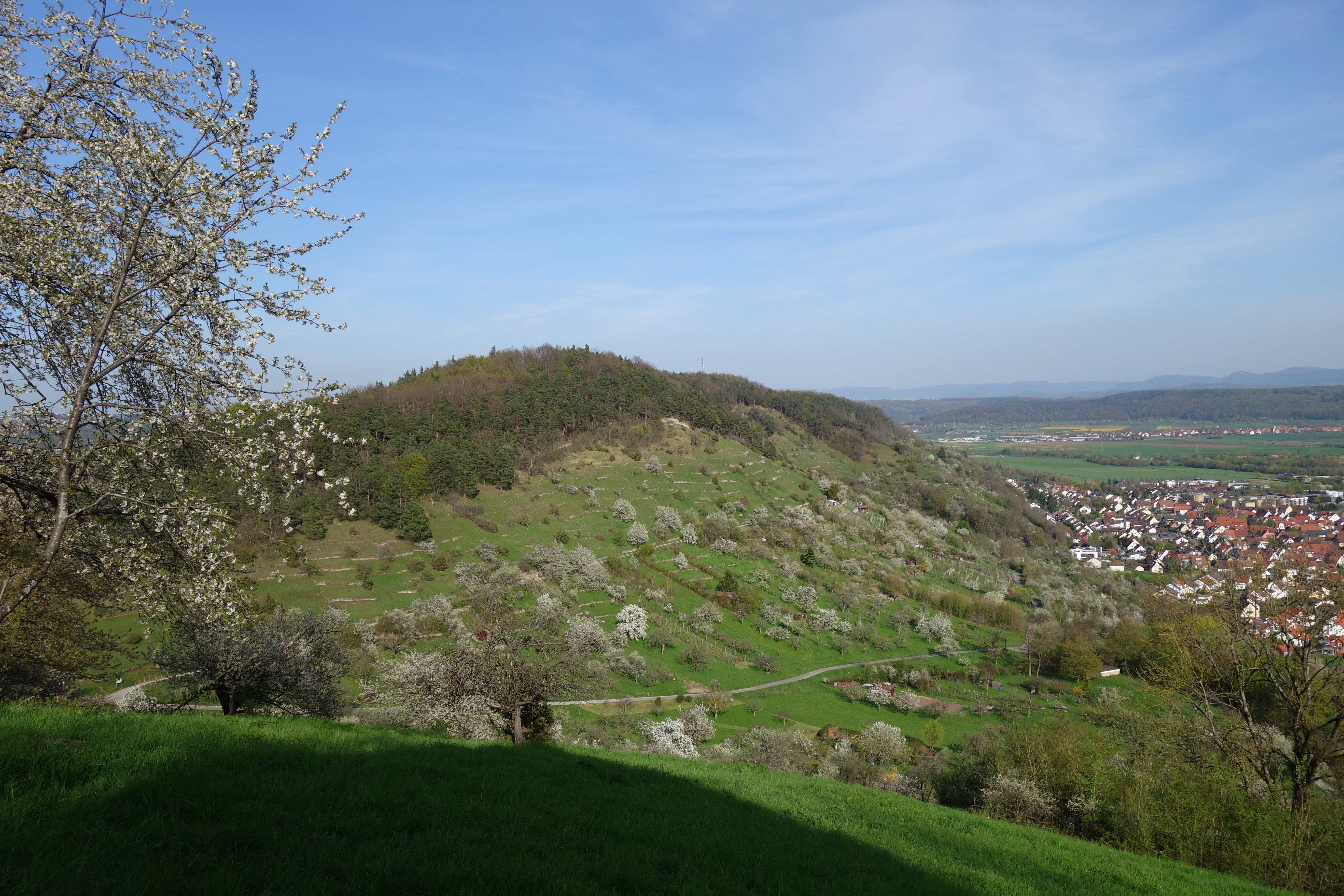 (NSG:BW-4.077)_Hirschauer Berg, Blick von der Wurmlinger Kapelle